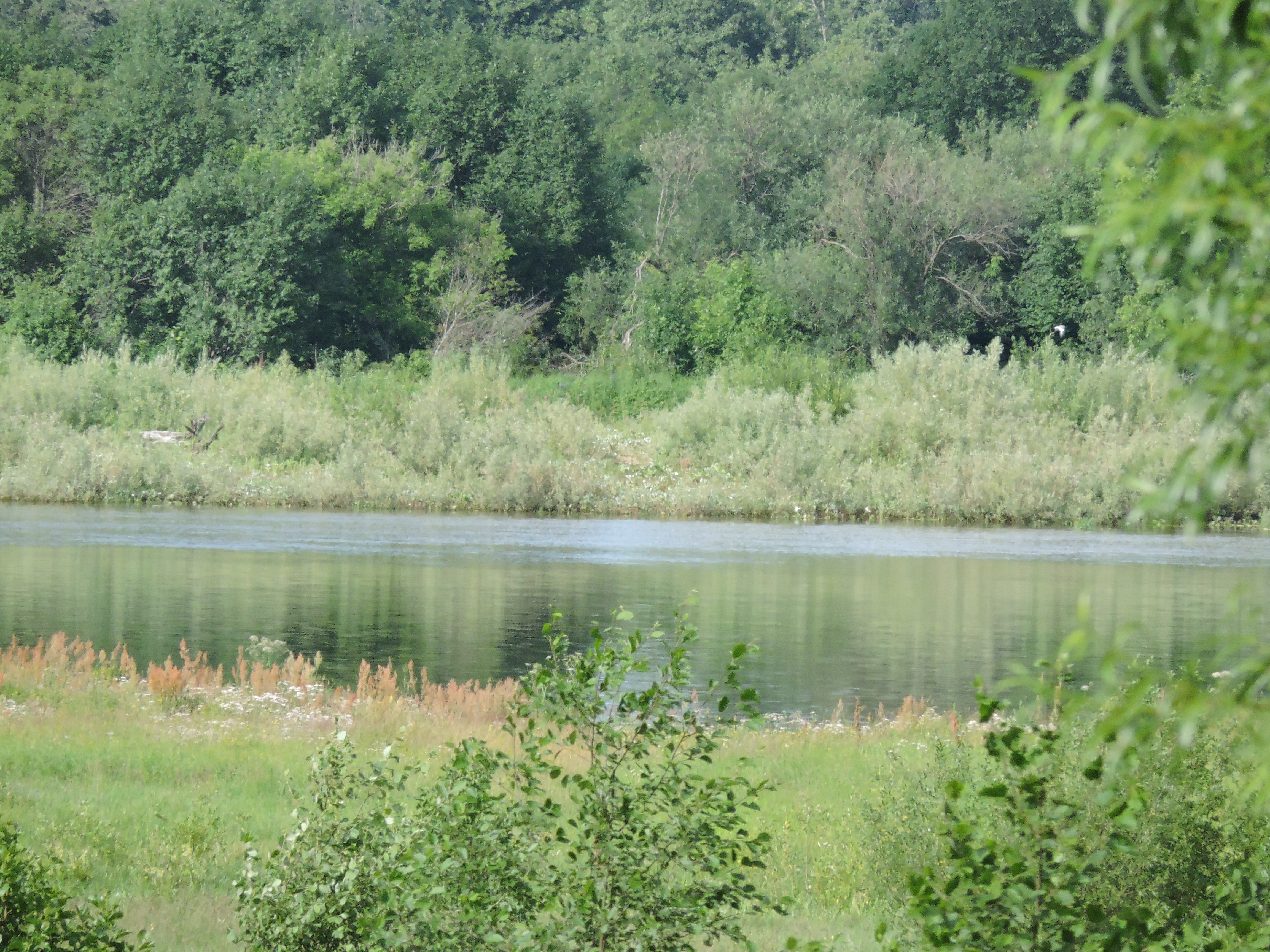 Заливной луг у Мологи в Слудах